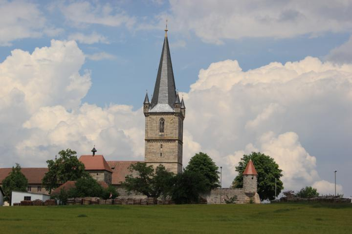 Die Wehrkirche Hannberg